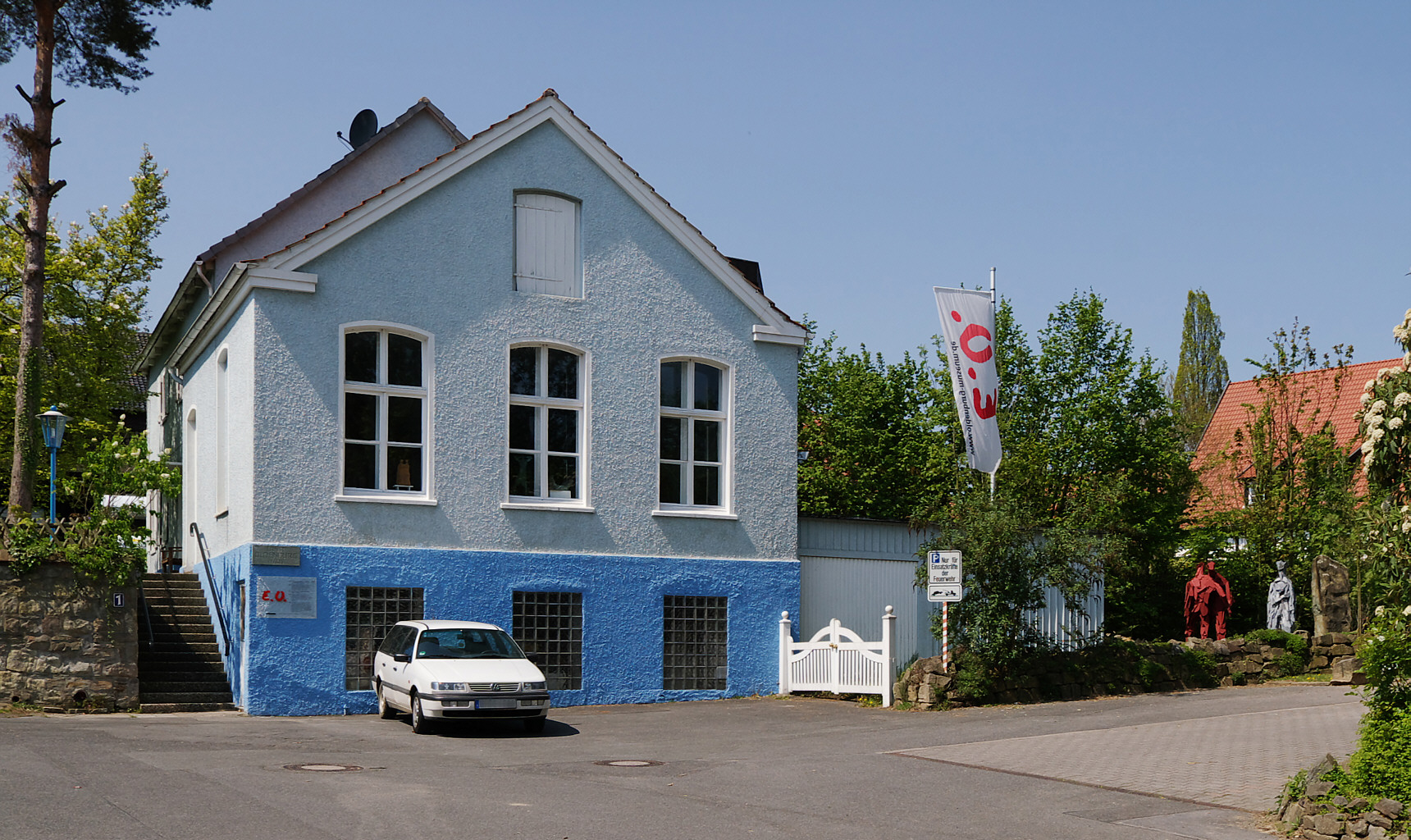 Das Ernst-Oldenburg-Museum in Unna-Kessebüren, letzte Wohn- und Wirkungsstätte das Malers, Grafikers und Bildhauers Ernst Oldenburg